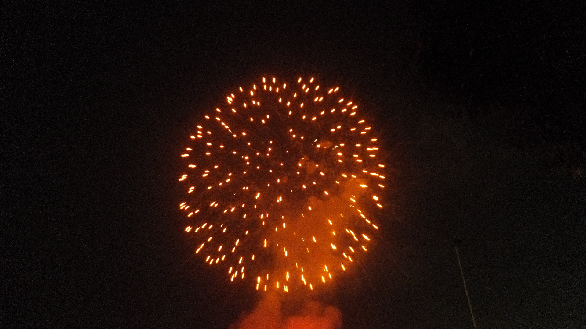 みっきぃ夏まつり花火大会 花火